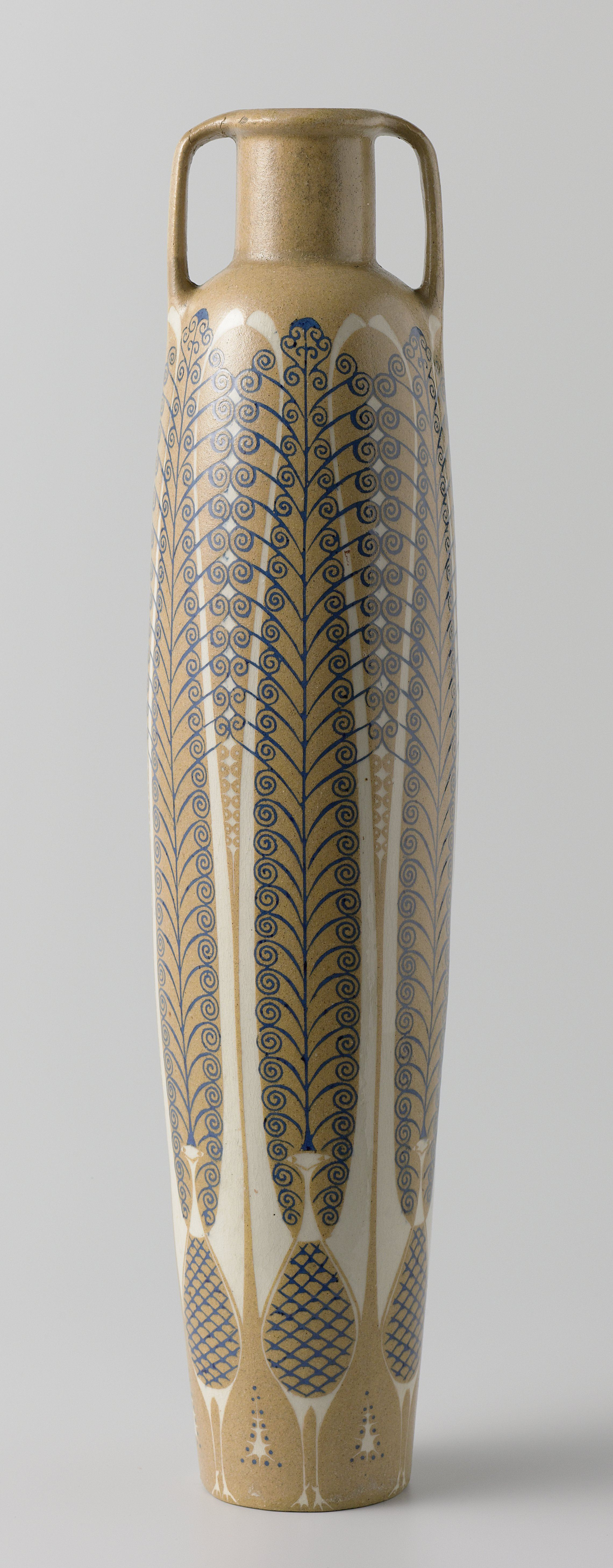 IdentificatieTitel(s): Cilindervormige vaas met gestileerde liervogels in wit en blauw op geelbruine fondObjecttype: vaas Objectnummer: BK-1970-54Omschrijving: Vaas van aardewerk, cilindervormig, naar boven iets breder wordend, met inspringende korte hals; twee oren tussen schouder en mondrand. Versierd met gestileerde liervogels in wit en blauw op geelbruine fond. Amsterdam, Amstelhoek, naar ontwerp van C.J. van der Hoef. Gemerkt. Ca. 1902.VervaardigingVervaardiger: ontwerper: Chris van der HoefAmstelhoekPlaats vervaardiging: AmsterdamDatering: 1902Materiaal: aardewerk glazuur Afmetingen: h 40,2 cm. × d 9,1 cm. Verwerving en rechtenVerwerving: aankoop 1970Copyright: Publiek domein